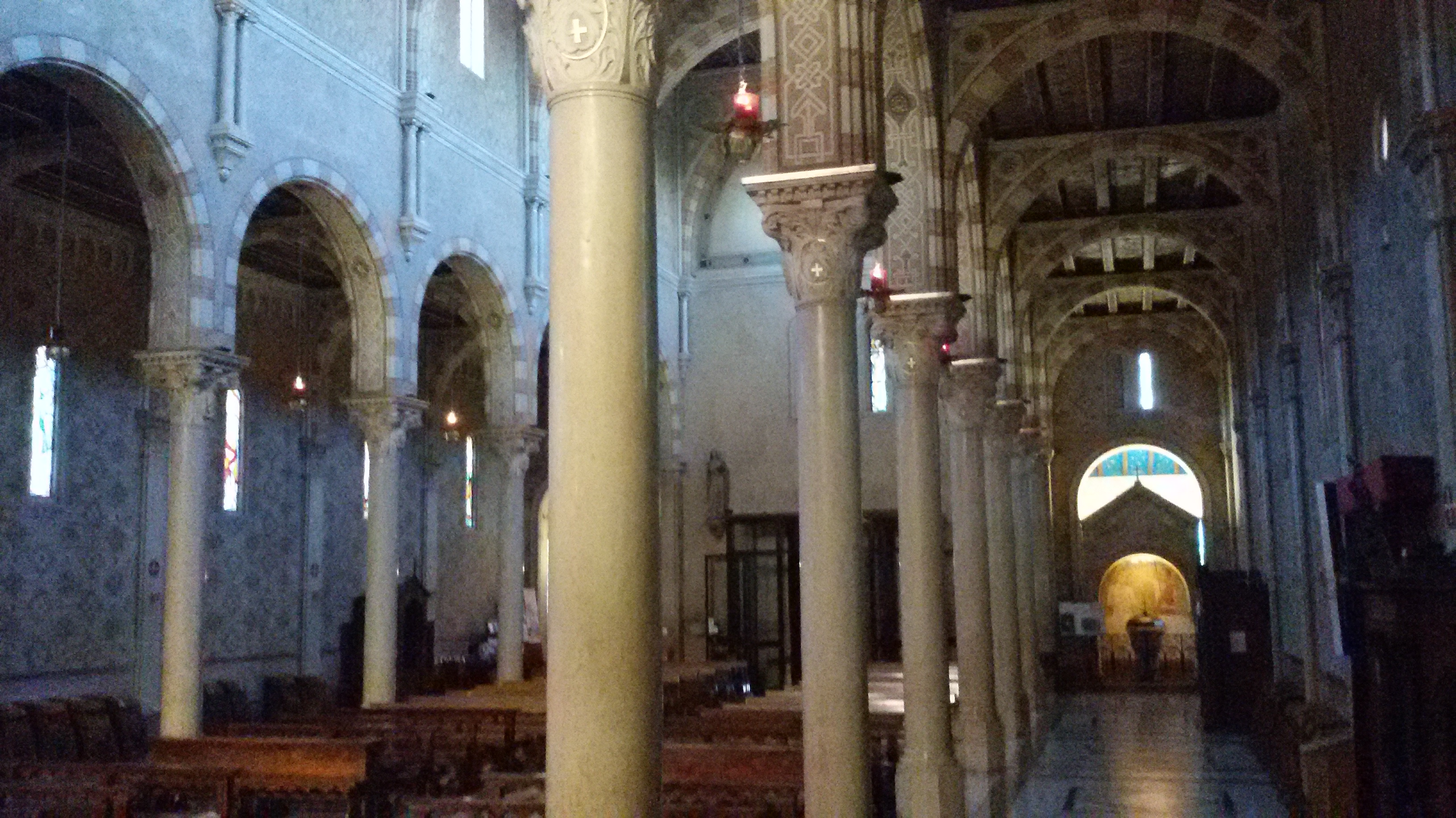 Chiesa di Santa Cristina Quinto di Treviso